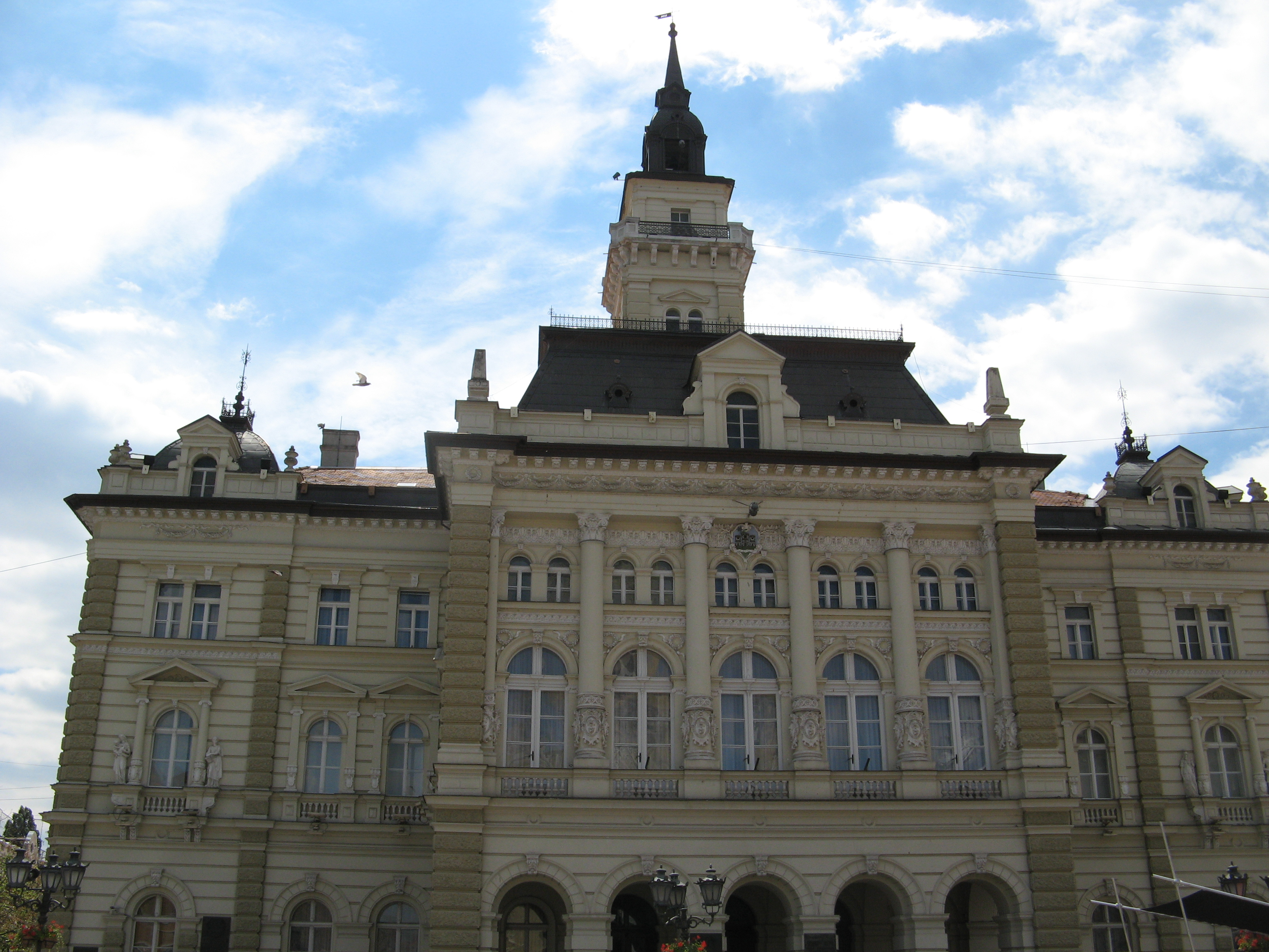 Градска кућа у Новом Саду